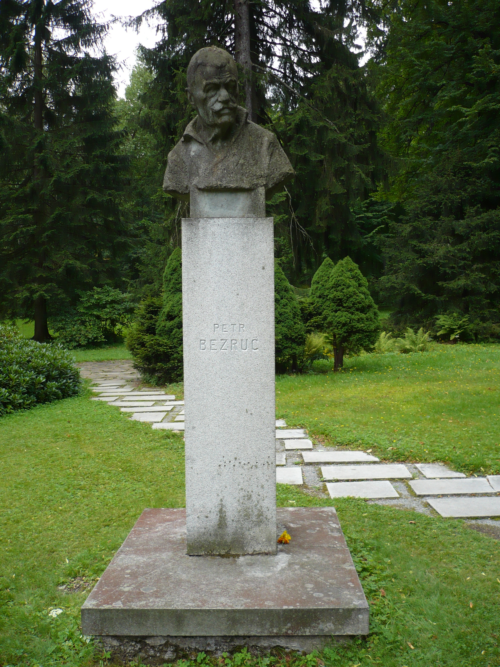 Statue of Petr Bezruč in Karlova Studánka